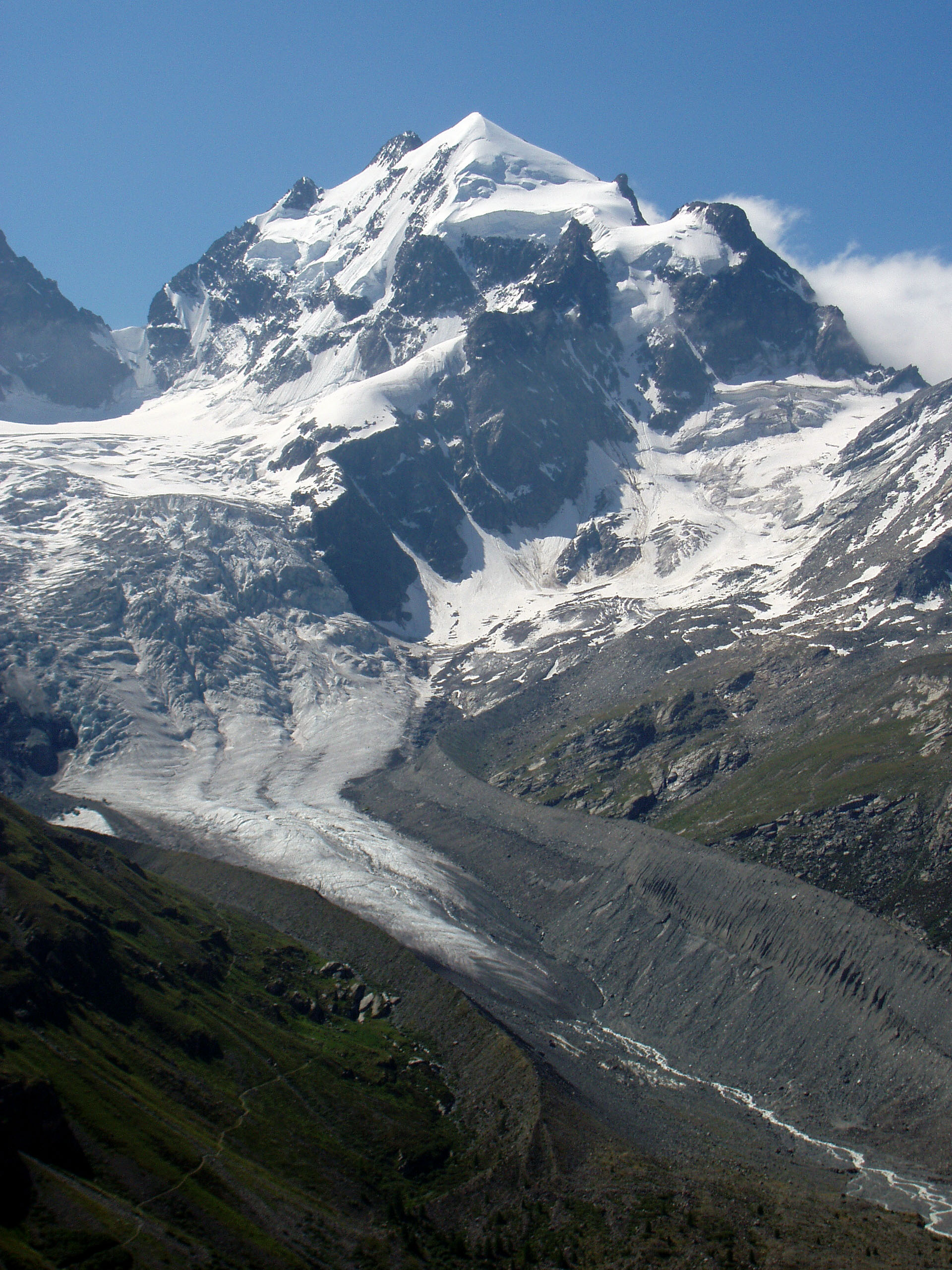 Der 3.943 m hohe Piz Roseg mit dem Tschiervagletscher (Vadret da Tschierva). Aufnahmestandort: Nähe Fuorcla Surlej über dem Engadiner Rosegtal.